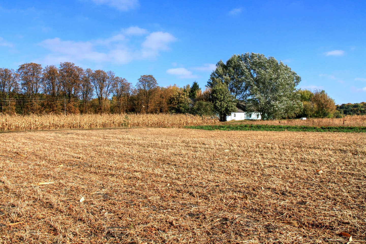 Павловский парк, монумент природы, находится в Бриченский район, с. Павловка (код MD-BR-map-002)